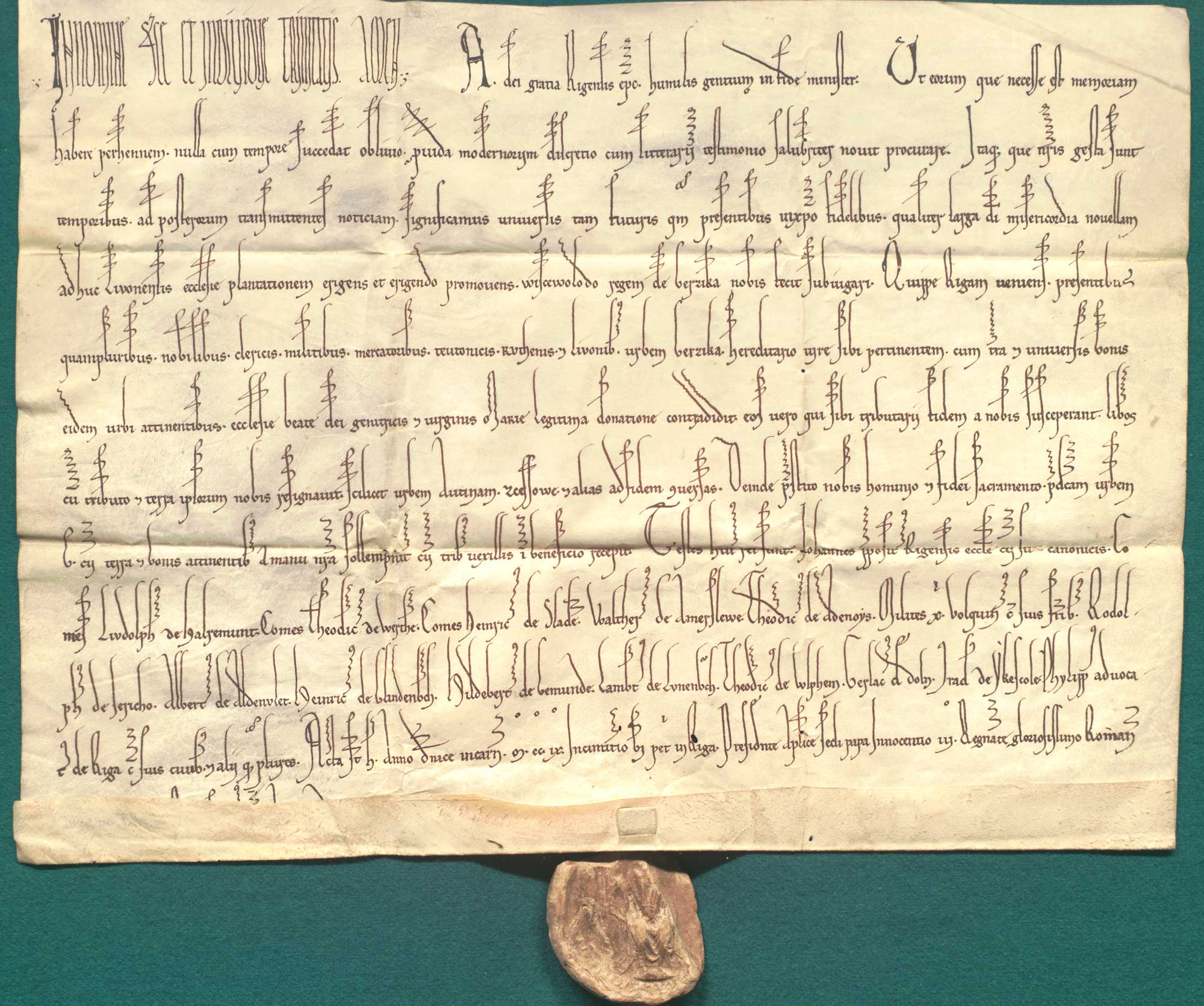 Albert, bp ryski, stwierdza, że Wiscevolodus, rex de Berzika, oddał kościołowi Panny Marii w Rydze swoje dobra: miasto Berzika, Autinam, Zessowe, które po złożeniu przysięgi otrzymał w lenno. Język: łac. Opis zewnętrzny: oryg., 1 k. pergaminowa, 44,1 x 23,5 cm; pieczęć na pasku